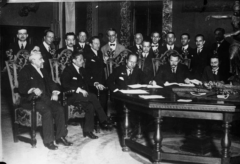 Die Unterzeichnung des italienisch-russischen Vertrages, in welchem die Anerkennung Russlands durch Italien enthalten ist. In der Mitte Mussolini zeichnet den Vertrag für Italien, rechts von ihm, Jordanzky, welcher für Russland zeichnete. Die Unterzeichnung des Vertrages fand am 7. Februar 1924 in Palais Chigi in Rom statt. Information added by Wikimedia users.* Benito Mussolini attorniato da una delegazione russa a Palazzo Chigi il 2 febbraio 1924.